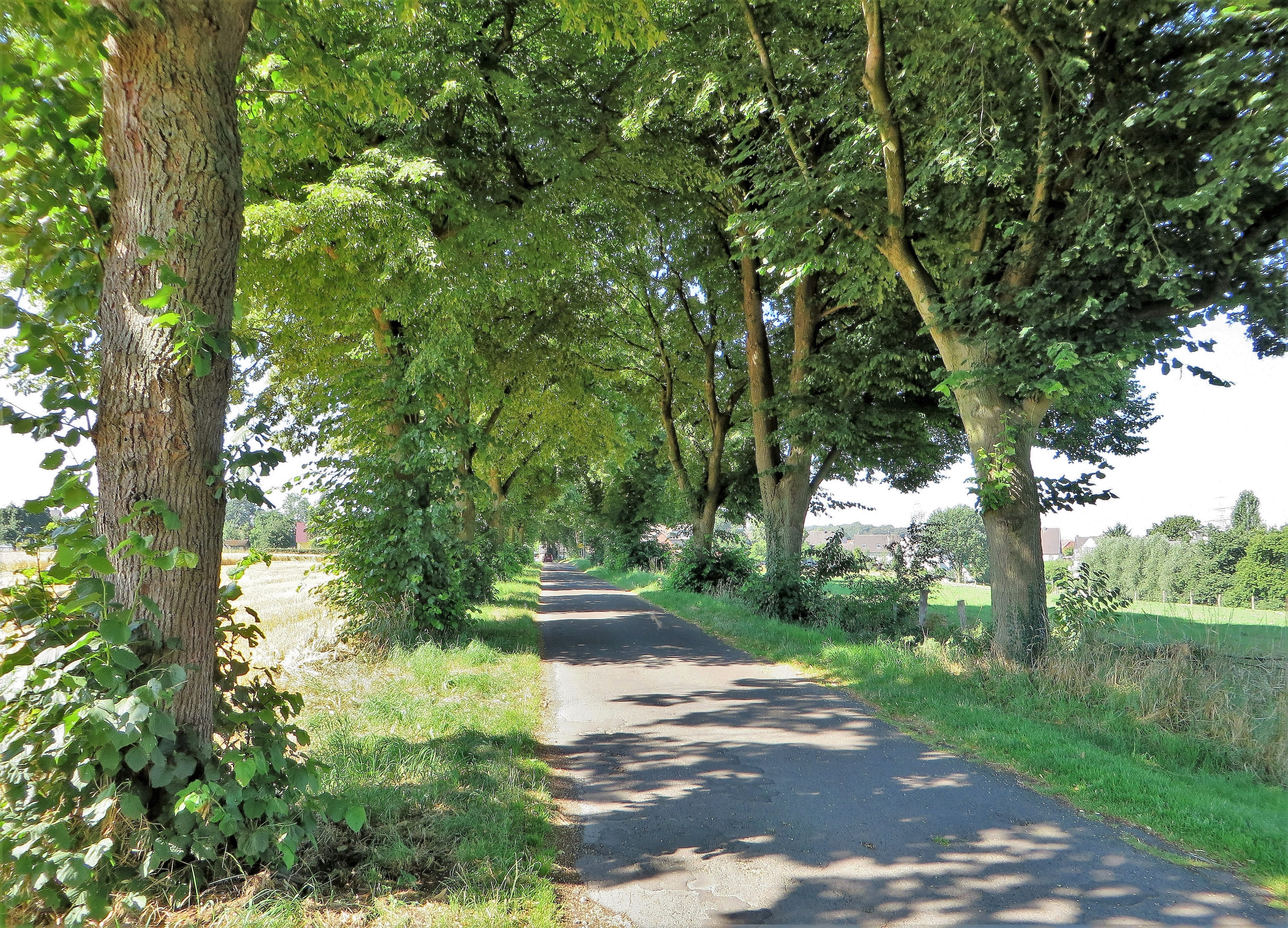 Geschützter Landschaftsbestandteil „Lindenallee zur Feldlage“ im Hagener Stadtteil Garenfeld, auch gesetzlich geschützte Allee (Alleenkataster NRW AL-HA-0003). Nordöstlich von Garenfeld erstreckt sich die Lindenallee auf einer Länge von 750 Meter entlang der Straße „Zur Feldlage“. Der Straßenbereich liegt im Landschaftsschutzgebiet „Garenfeld“. Auf dem Foto rechts hinter der Weide befindet sich der geschützte Landschaftsbestandteil „Gehölzstreifen Garenfeld“.